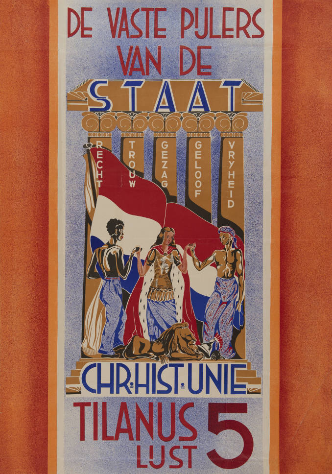 Partij CHU/Partijnaam voluit Christelijk-Historische Unie/Functie Tweede Kamerverkiezingen/Jaar 1948/Datum verkiezingen 07-07-1948/Lijsttrekker afgebeeld/genoemd Hendrik Tilanus/Tekst De vaste pijlers van de staat - Recht - Trouw - Gezag - Geloof - Vrijheid - Chr. Hist. Unie - Tilanus - Lijst 5